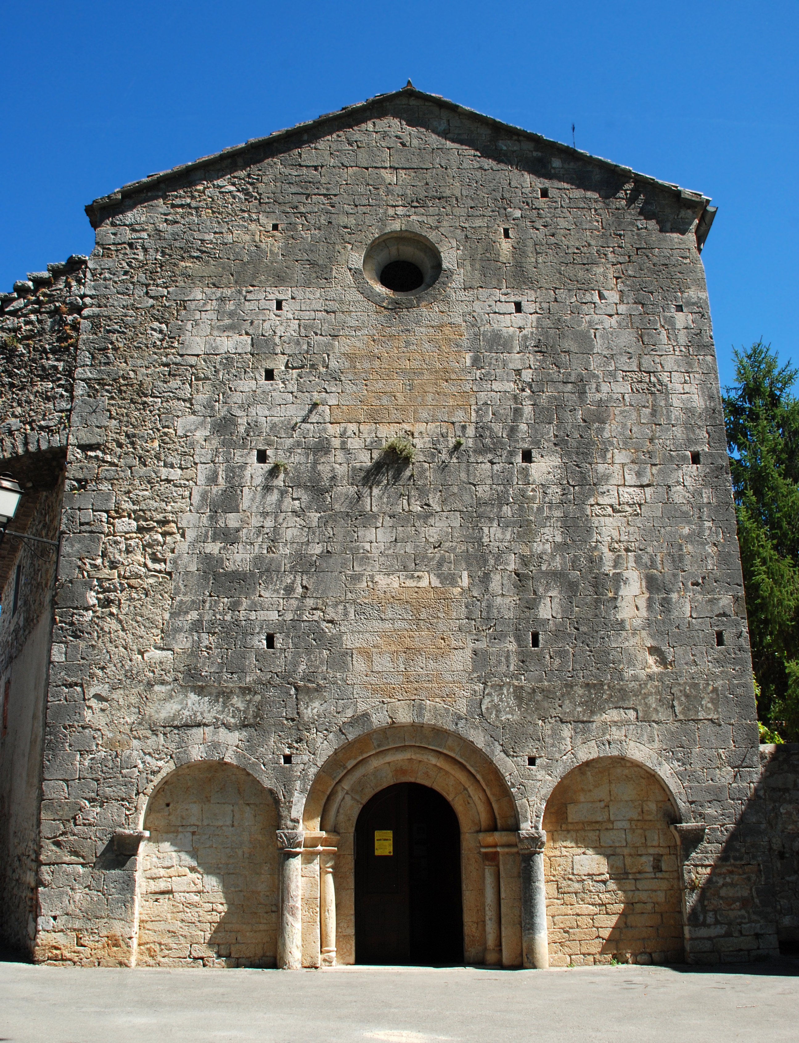 France - Hérault - Église Saint-Nazaire et Saint-Celse de Brissac